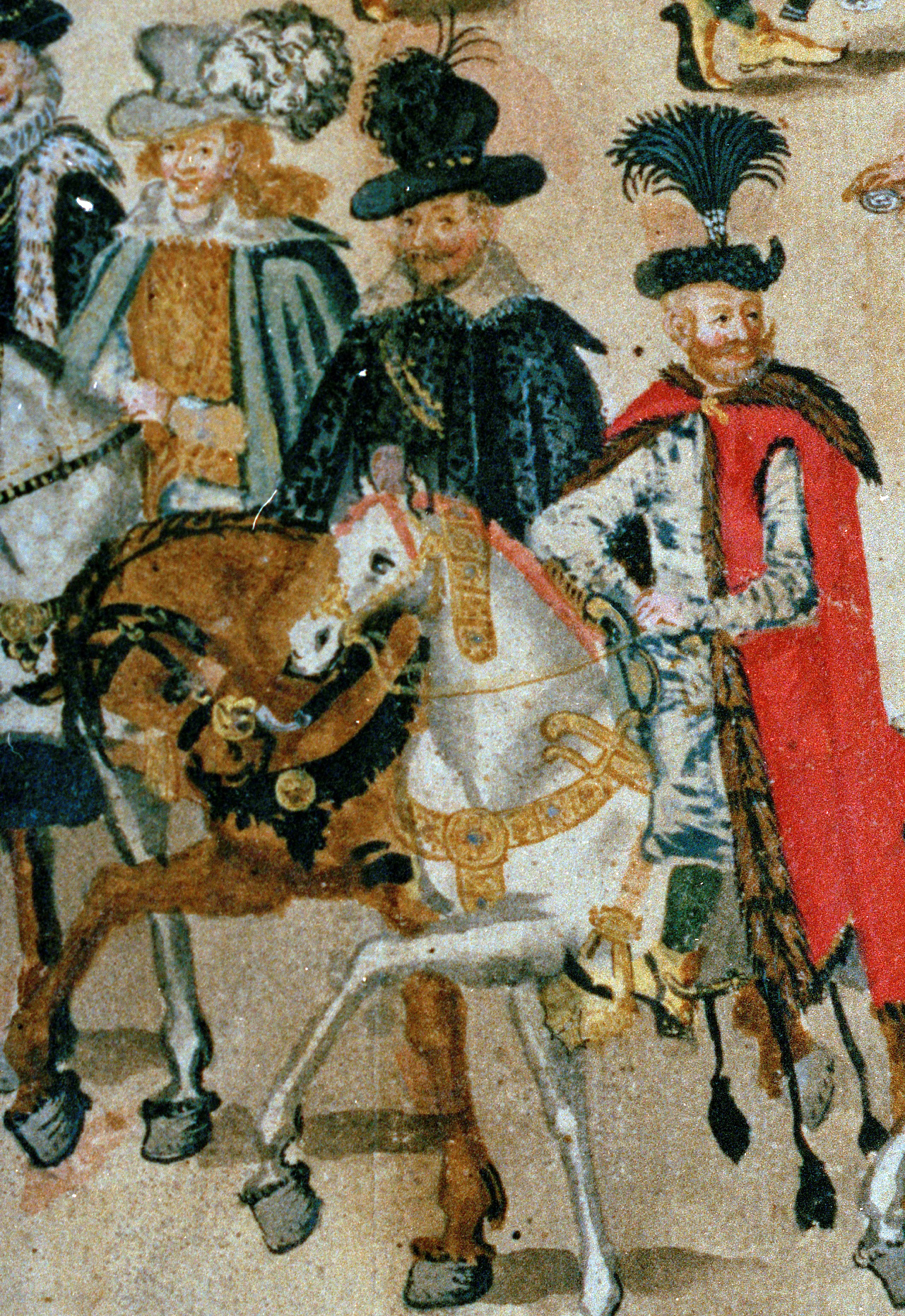 Georg II. von Pommern (Mitte) als Gesandter des Greifenhauses bei der Hochzeit König Sigismund III. von Polen. (vgl. Hellmuth Bethe, Baltische Studien, Die Bildnisse des pommerschen Herzoghauses II.)